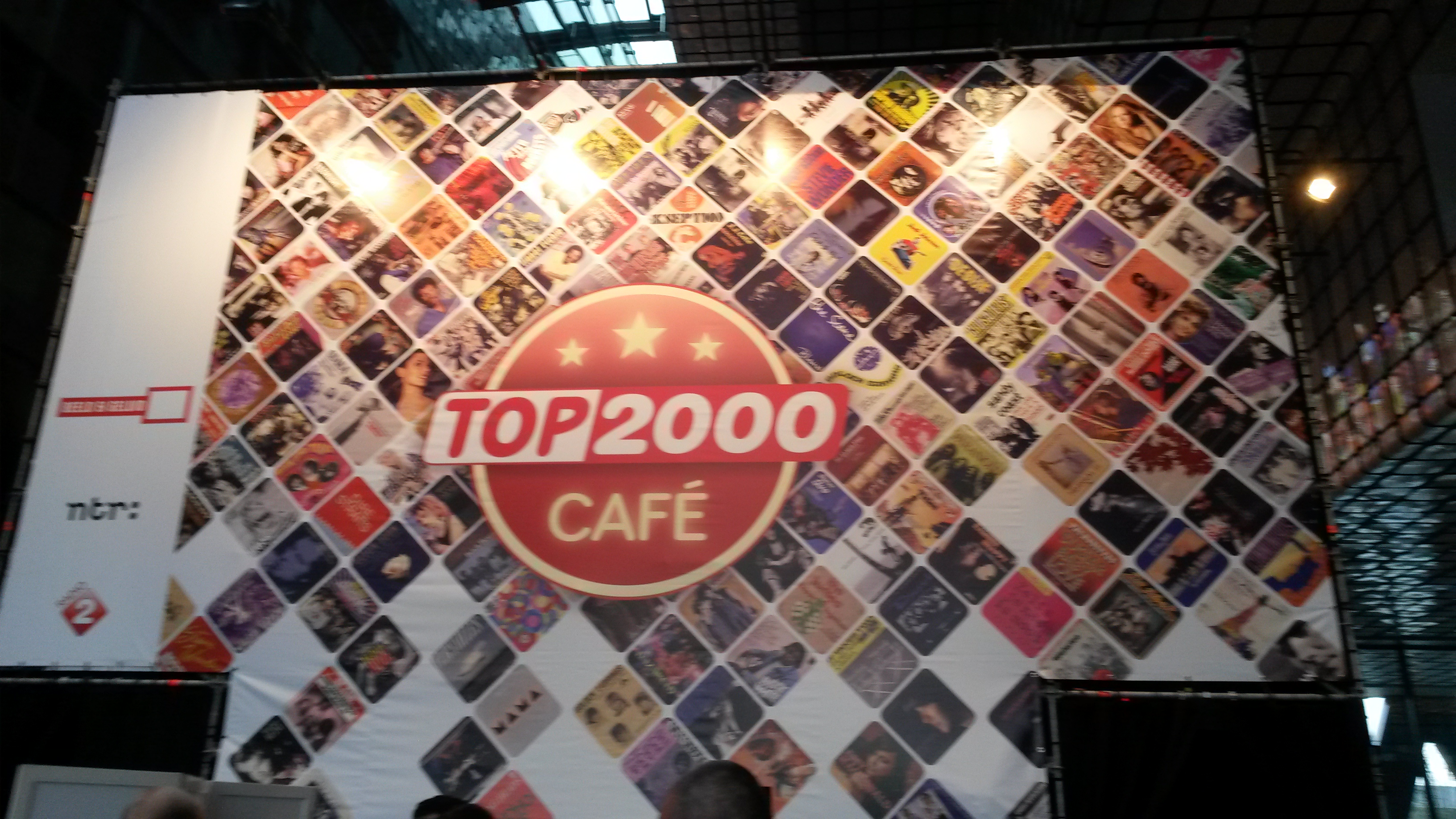 Buitenzijde van studiocafé, gebruikt voor opnames van de Top 2000 à Go-Go. (Bij Beeld & Geluid, Hilversum, 15 dec. 2013)